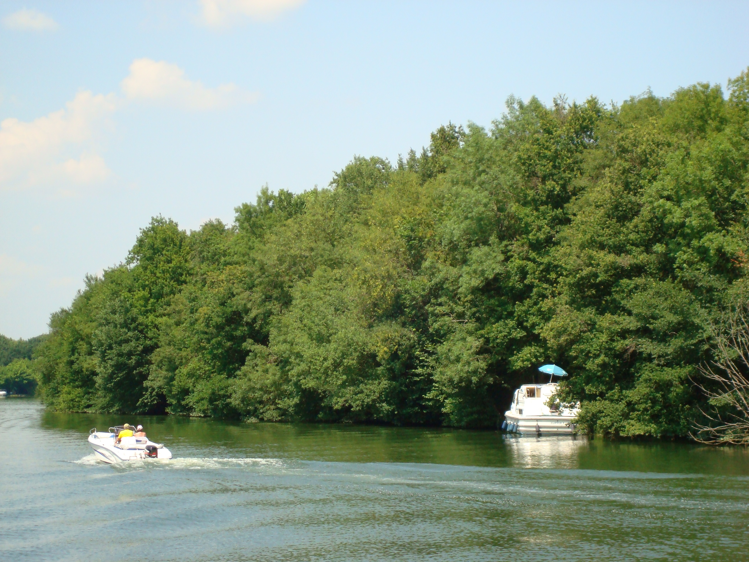 Tourisme fluvial sur la Saône